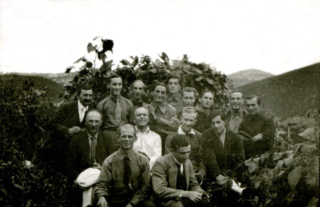 Nyikolszki Kabaré. Ismeretlen fényképész felvétele. 1919. márciusa és 1920. szeptembere között Nyikolszk-Usszurijszkijben (Szovjetúnió) készült. A felvételen a Nyikolszki Kabaré tagjai: Baghy Gyula, Bognár Rezső, Castiglione László, Elekes Sándor, Gubacs Gábor, Gyöngyi László, Lőcsey László, Katona István, Mészáros Dezső, Sándor Zoltán, Zimmer Emil. A középső sor jobb szélén: Castiglione László, a Társulat alapítója.